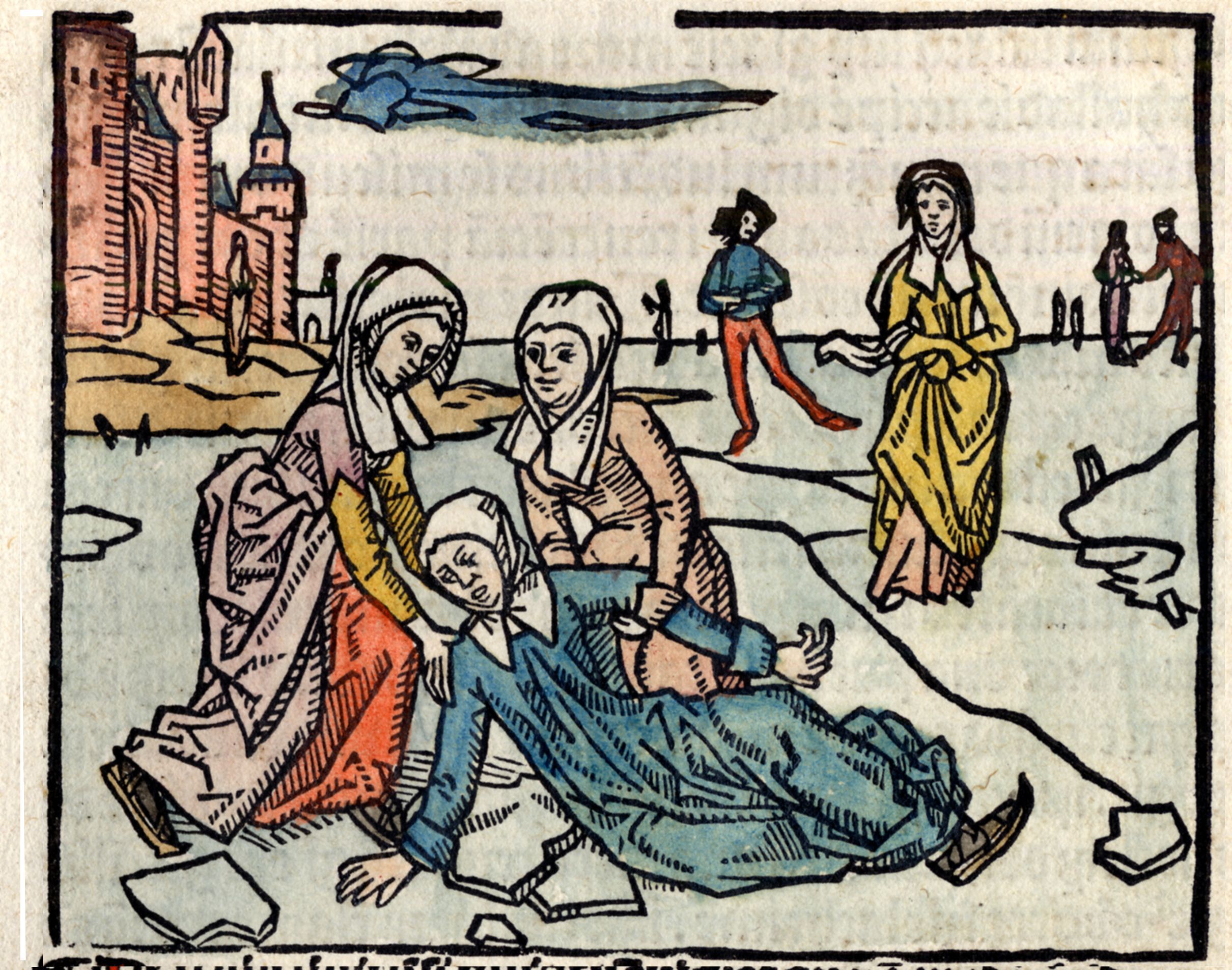 De val van Liduina op het ijs